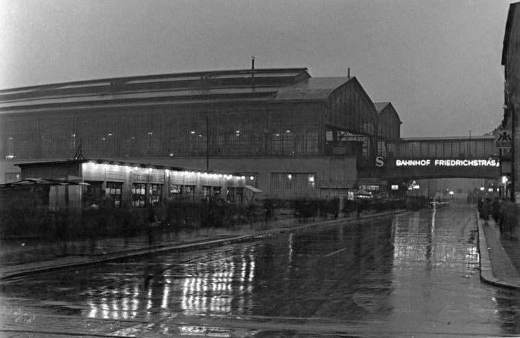 Berlin, Friedrichstraße, S-Bahnhof, Abend Illus Rudolph 28.11.50 Berlin 1950 Der Bahnhof Friedrichstrasse in Berlin hat jetzt eine repräsentative Leuchtschrift erhalten.